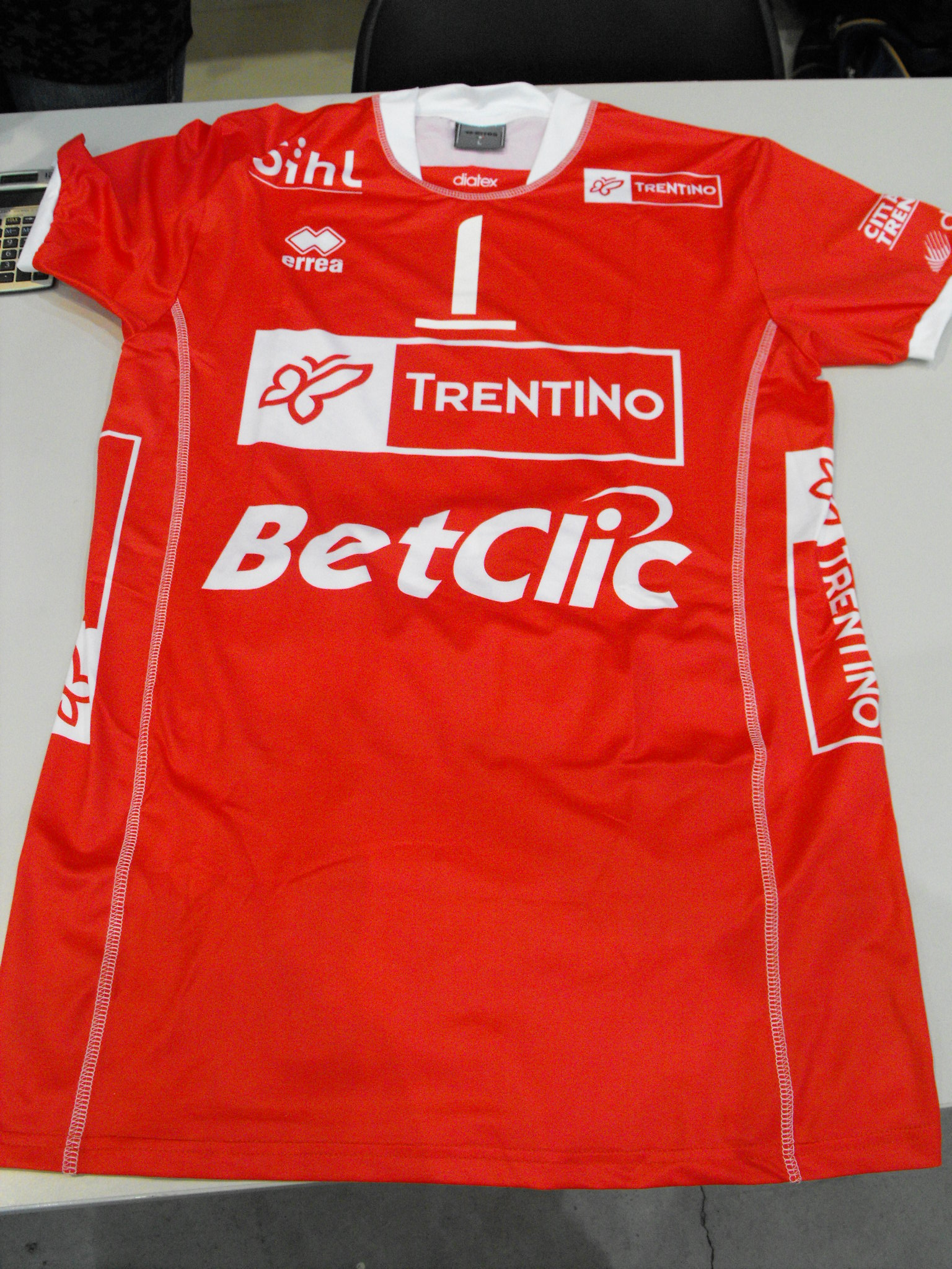 Maglia utilizzata dalla Trentino Volley per la Coppa del Mondo per club FIVB 2009. In quell'occasione la formazione si chiamò Trentino BetClic